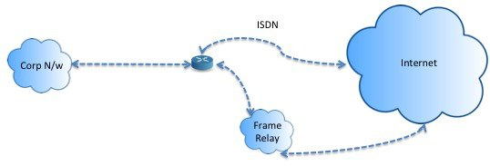 Монгол: Зураг3